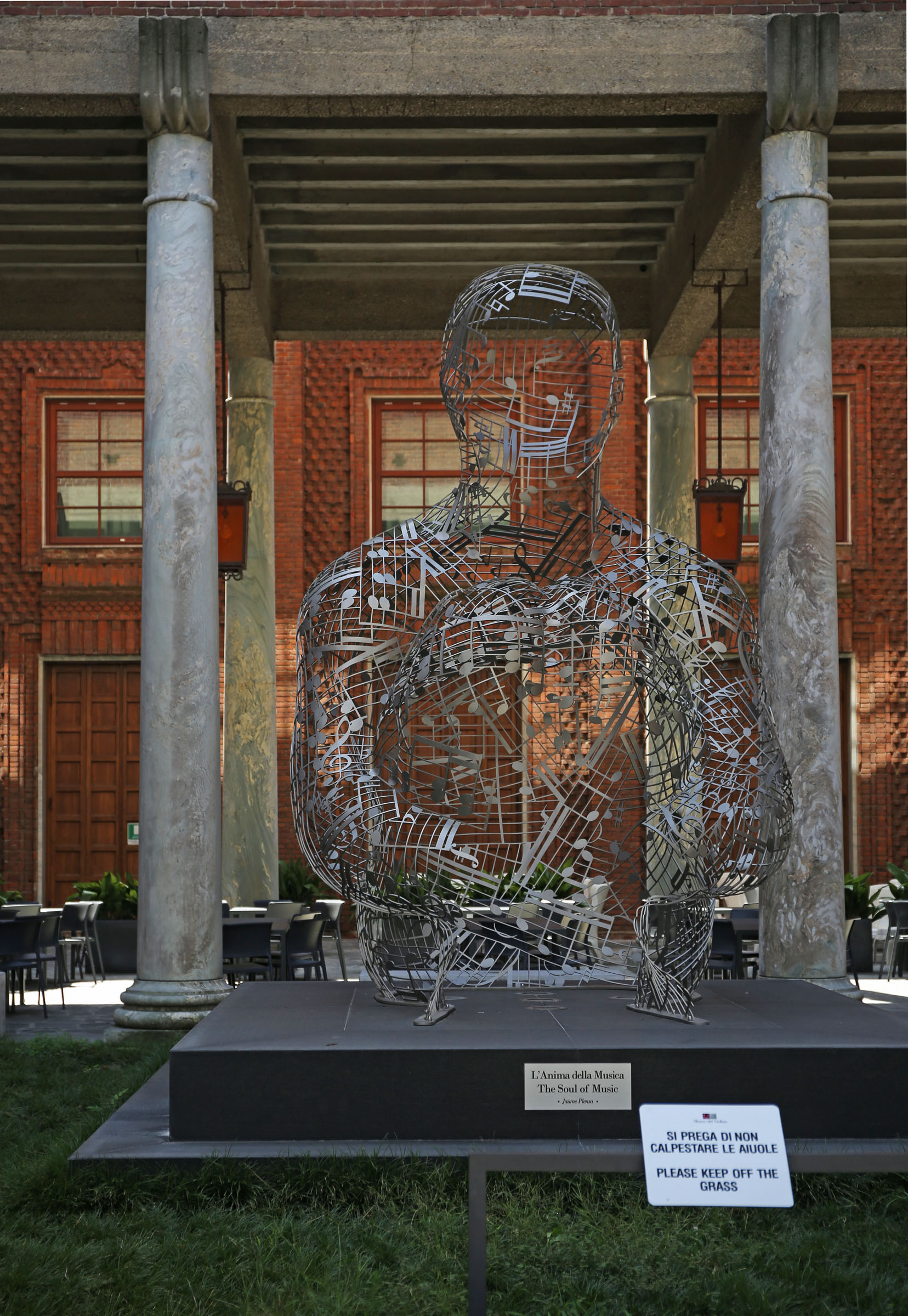 Palazzo dell'Arte This is a photo of a monument which is part of cultural heritage of Italy.